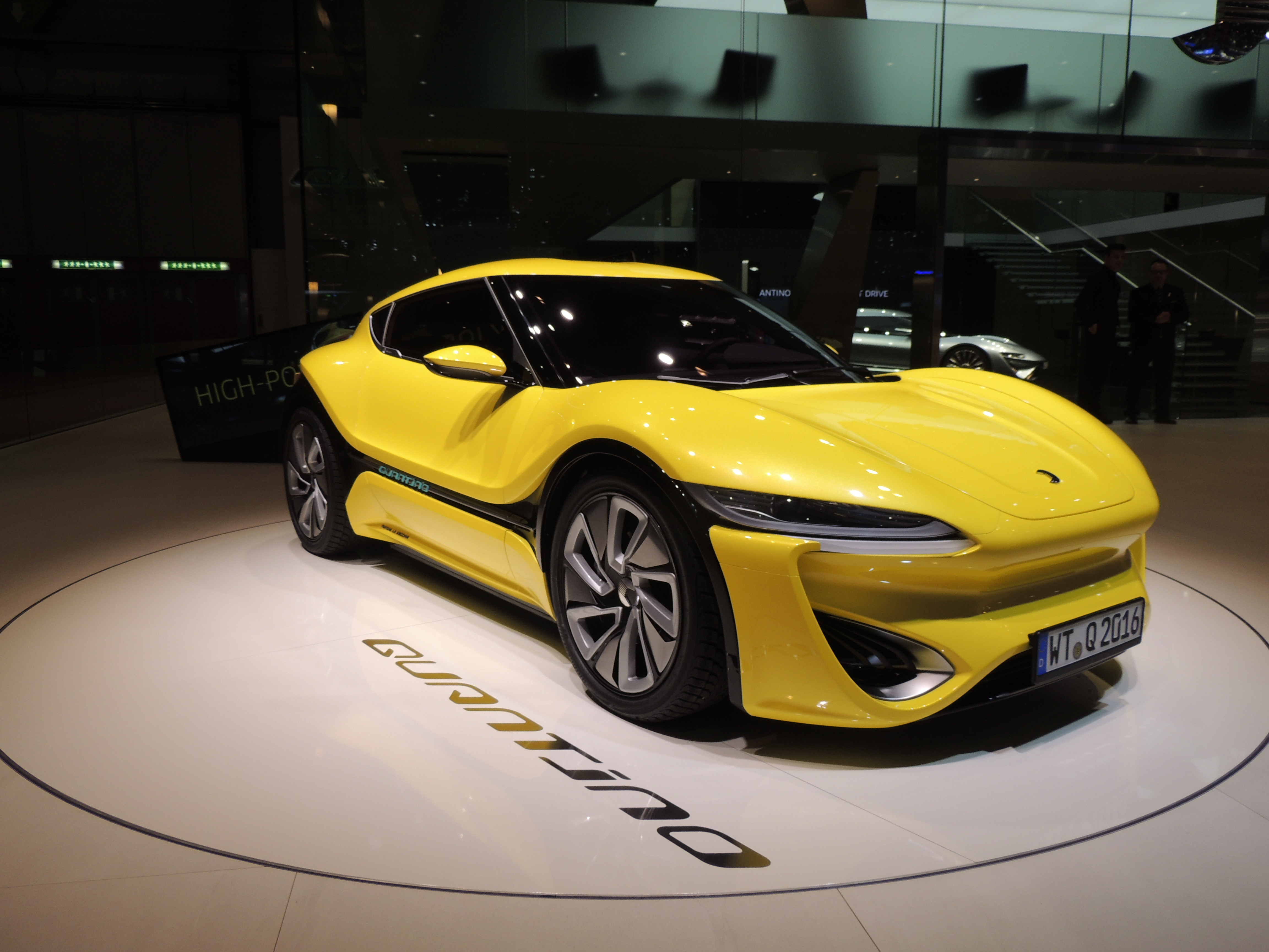 QUANTiNO Première mondiale